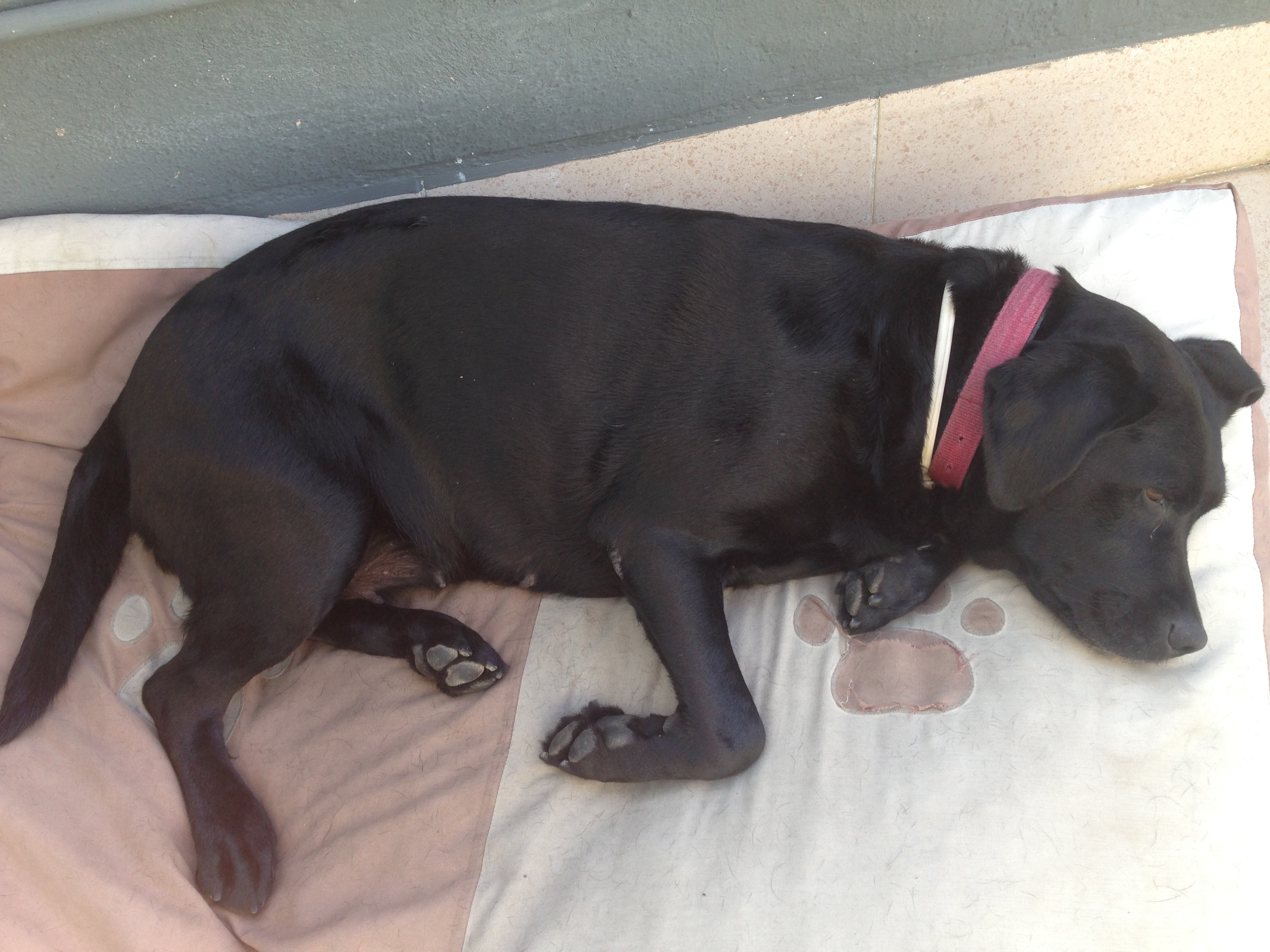 Els nivells normals de ghrelina en sang són de 1000nm/L aproximadament. Un excés de la hormona provoca sobrepés, com en aquesta gossa.